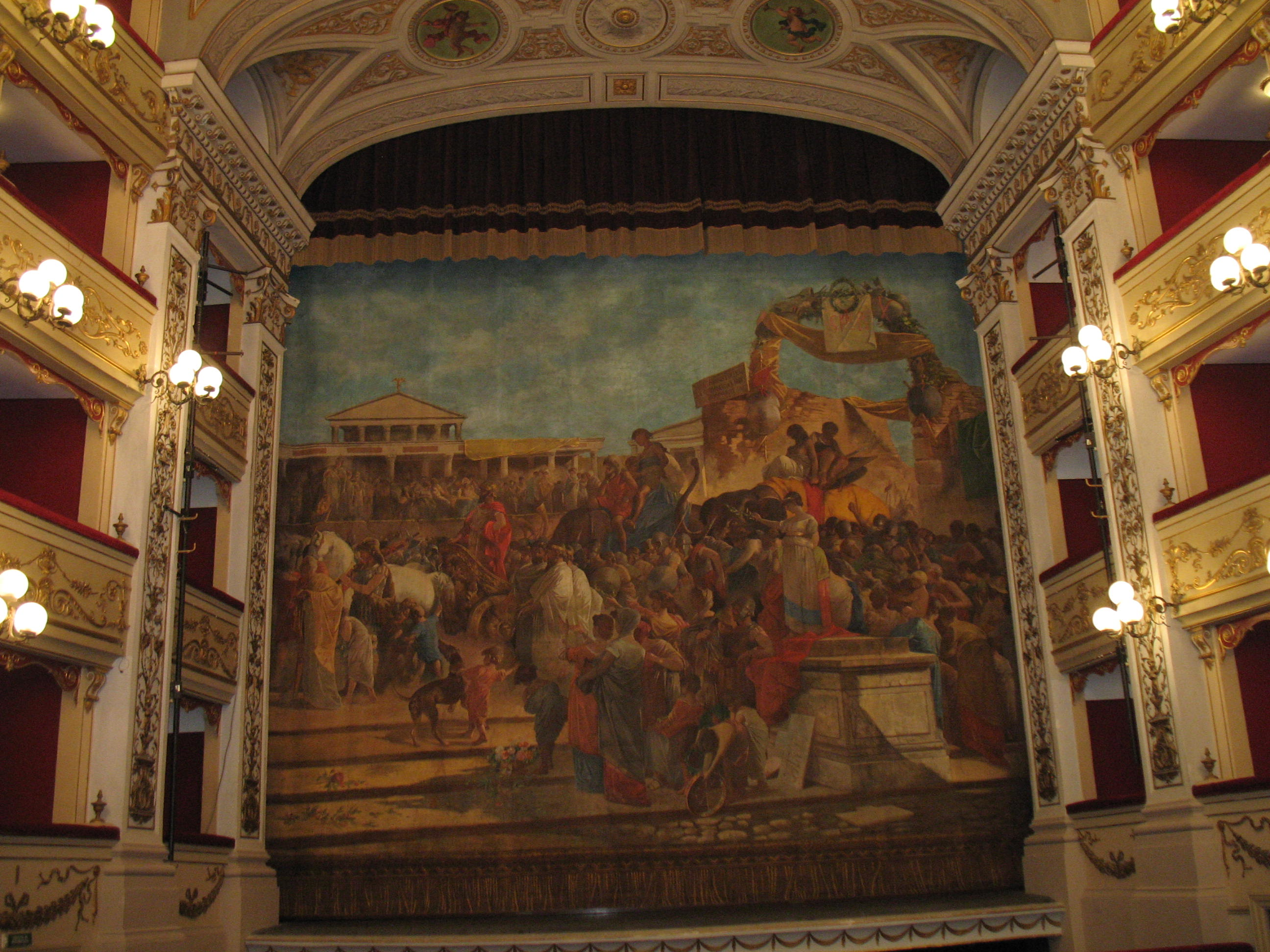 Palco del Teatro Marrucino di Chieti, fotografato dalla platea